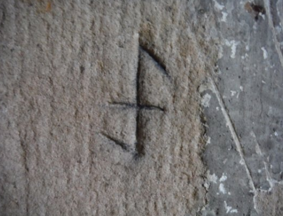 Un model de signe Eihwaz